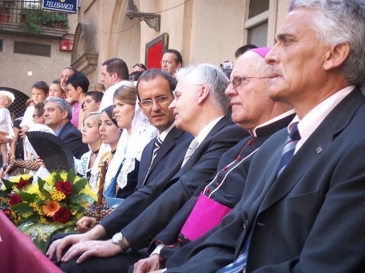 Membres de la Corporació Municipal i altre autoritats contemplant els ballets de la Festa Major de 2006 a la plaça Major. Solsona, 9 de setembre de 2006.